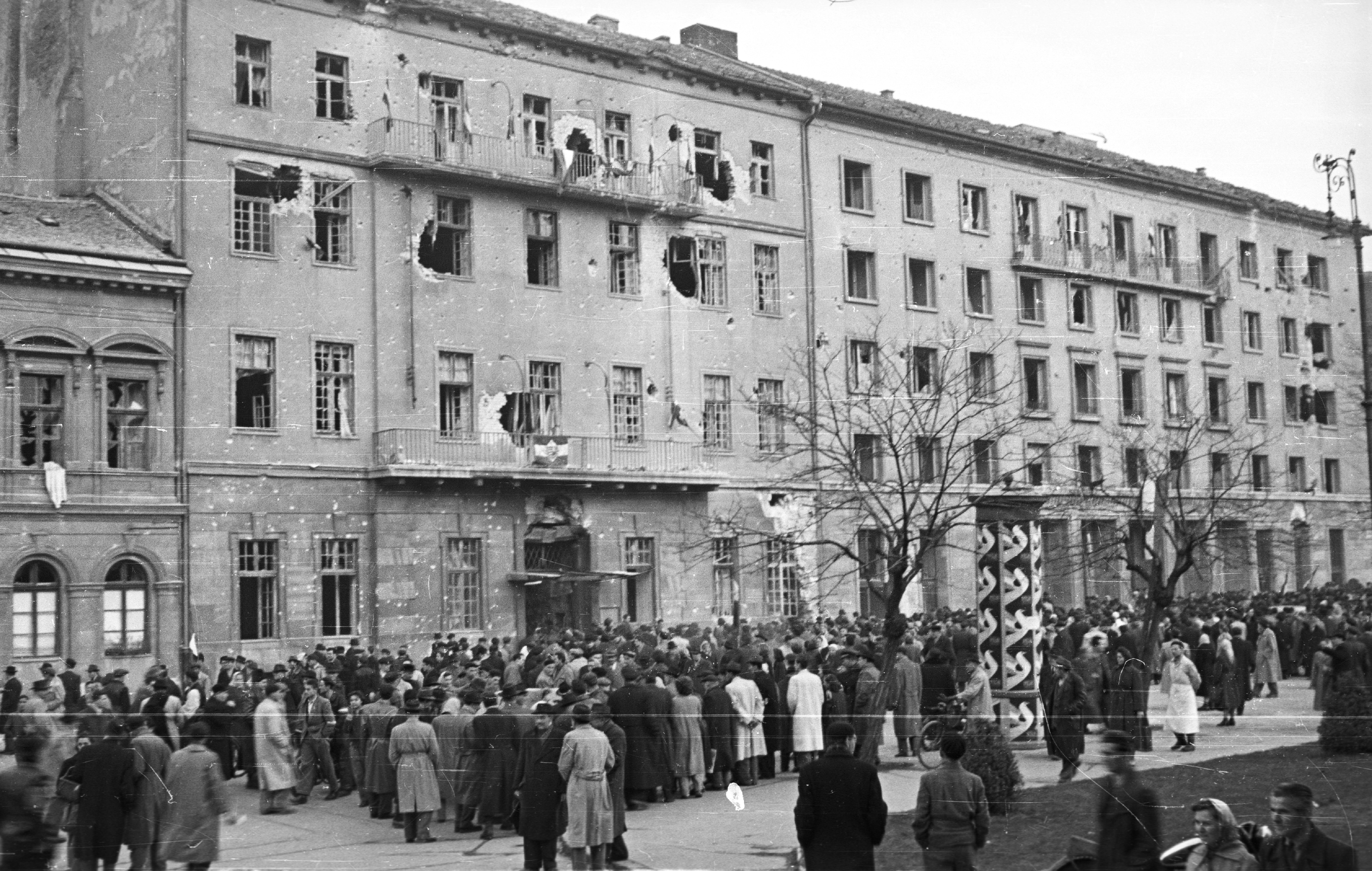 II. János Pál pápa (Köztársaság) tér, MDP Budapesti Pártbizottságának székháza. Location: Hungary, Budapest VIII. Tags: revolution, Party Headquarters, damaged building, mass, ad pillar, pedestrian, war damage, poster, Budapest Title: II. János Pál pápa (Köztársaság) tér, MDP Budapesti Pártbizottságának székháza.